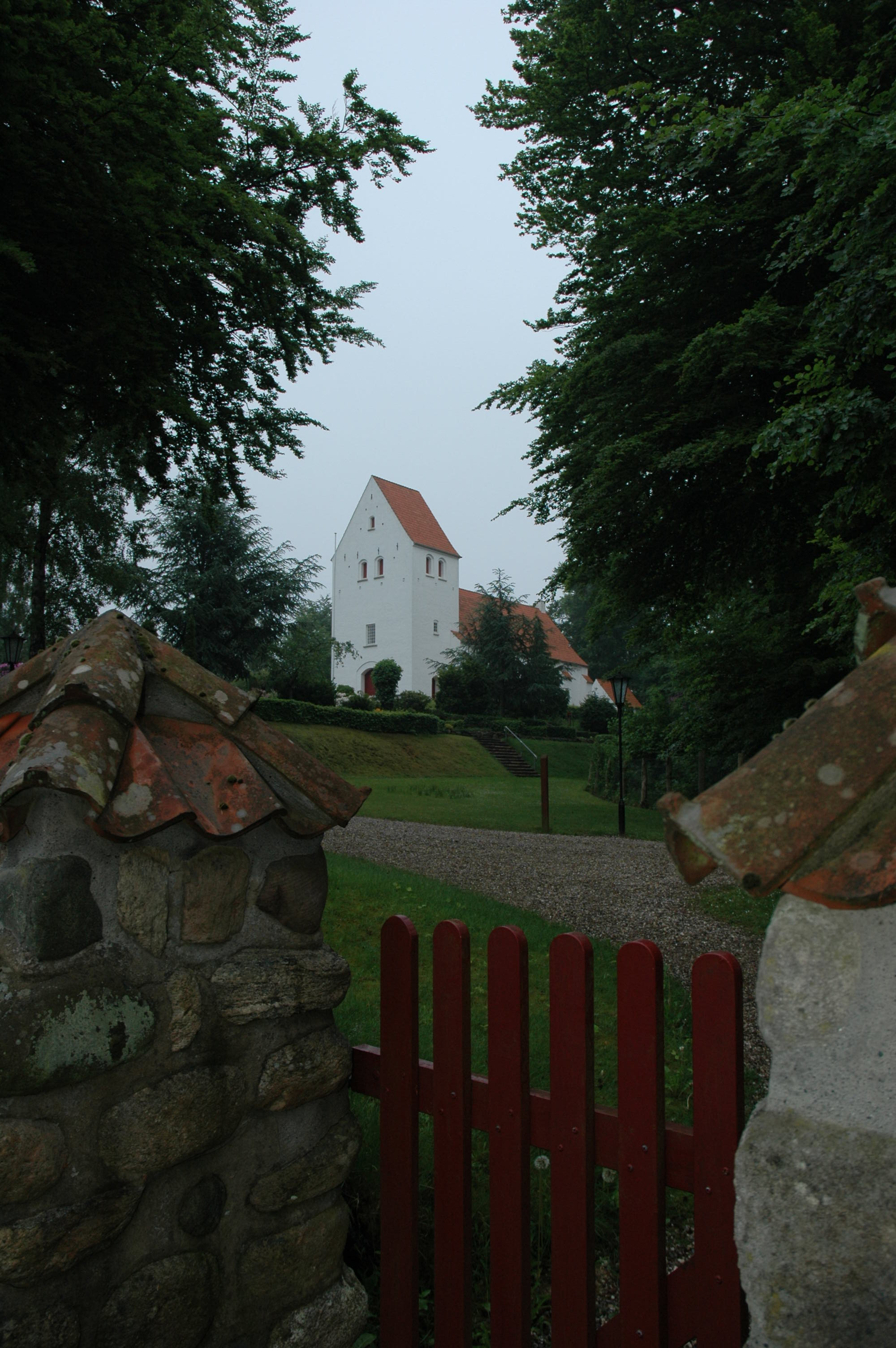 Billede af Gurre kirke taget fra foden af krikebakken